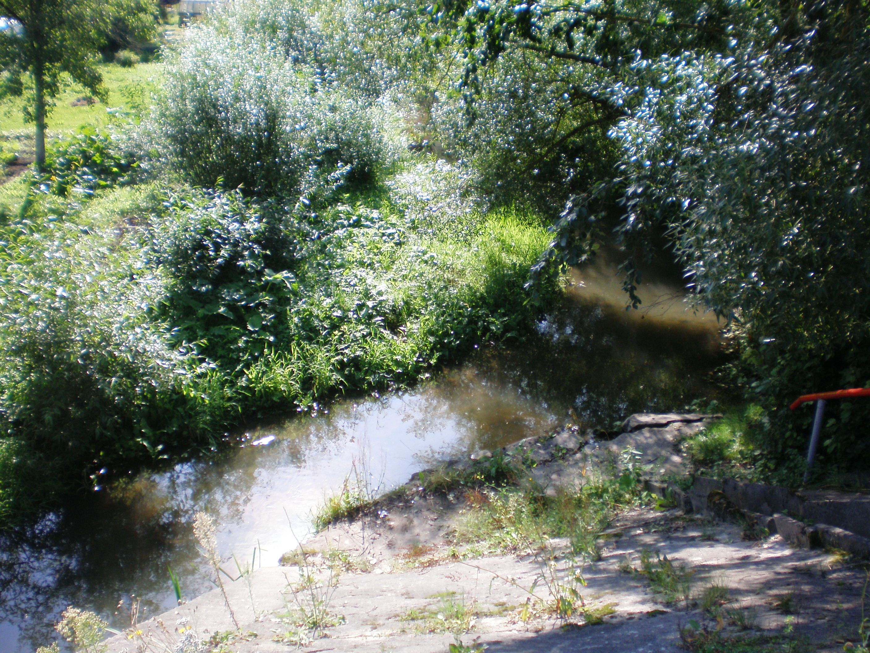 Anykšta Anykščiuose, Lietuva